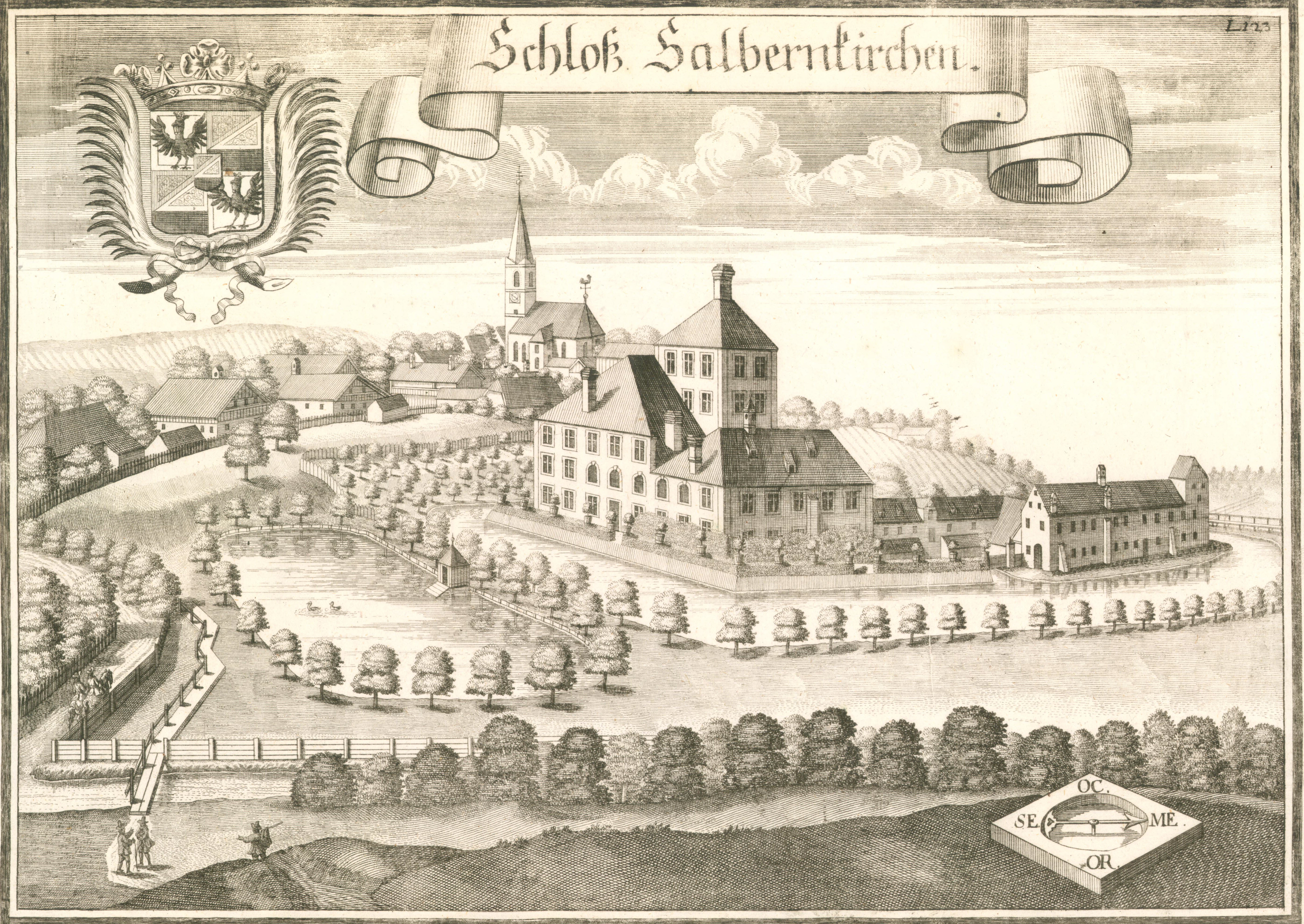 Ansicht des Schlosses von Salmanskirchen bei Ampfing in Bayern, Deutschland. Stich von Michael Wening.